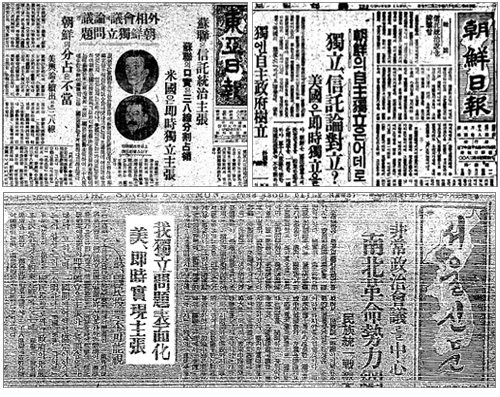 1945년 12월 27일자 동아일보에 모스크바 3상회의에서 미국은 한국의 즉시 독립을 주장하고, 소련이 신탁통치를 주장했다는 기사가 났고, KBS ‘미디어포커스’는 2003년 12월 방송에서 동아일보의 소련이 신탁통치를 주장했다는 보도가 격렬한 반탁운동을 촉발시켰다고 주장했다. 하지만 같은 날 같은 내용의 기사가 조선일보와 좌익 성향의 서울 신문에도 보도된 것이 확인된다 (위 이미지). 이러한 보도는 UP 및 AP 등 미국 통신사 발 기사를 국내 언론이 합동통신을 통해 받아 실은 것에 불과하며, 미국의 워싱턴 타임스 헤럴드(워싱턴 포스트 전신)도 1945년 12월 26일자 7면에 UP 기사를 전재한 ‘May Grant Korea Freedom’이라는 기사를 통해 “미국의 번스 국무장관이 소련의 신탁통치안을 반대하고 한국의 즉시 독립을 주장하라는 훈령을 받고 러시아로 떠난 것으로 알려졌다”고 보도했다. 당시에는 좌익도 반탁을 주장하고 있었으므로 소련이 신탁통치를 주장했다는 보도가 반탁을 촉발한 것이 아니라, 신탁통치를 결정한 것 자체에 대해 좌우익 모두 반대한 것이 분명하다. 나중에 소련의 지시를 받은 좌익들이 찬탁으로 돌아선 것이다. 국내에서 미군정과 달리 신탁통치를 적극 주장한 소련의 행동으로 보아 이 기사가 오보라고 보기도 힘들다. 참고자료 : (17) 삼상회의 보도 동아일보 2004-12-12 / 좌익 '찬탁돌변' 남북분단 불러 동아일보 2005-12-29